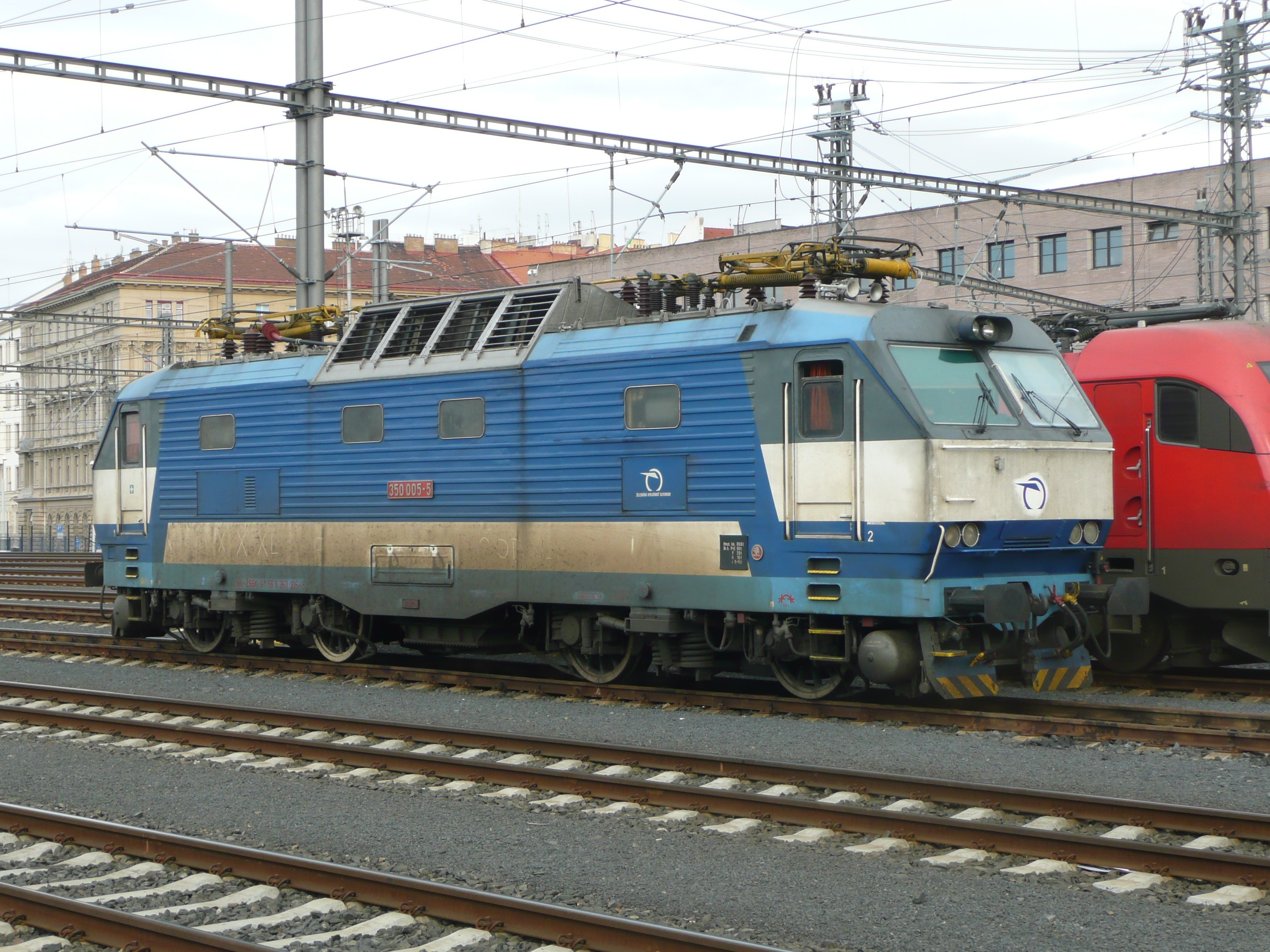 350.005 abgestellt in Praha hl. n.